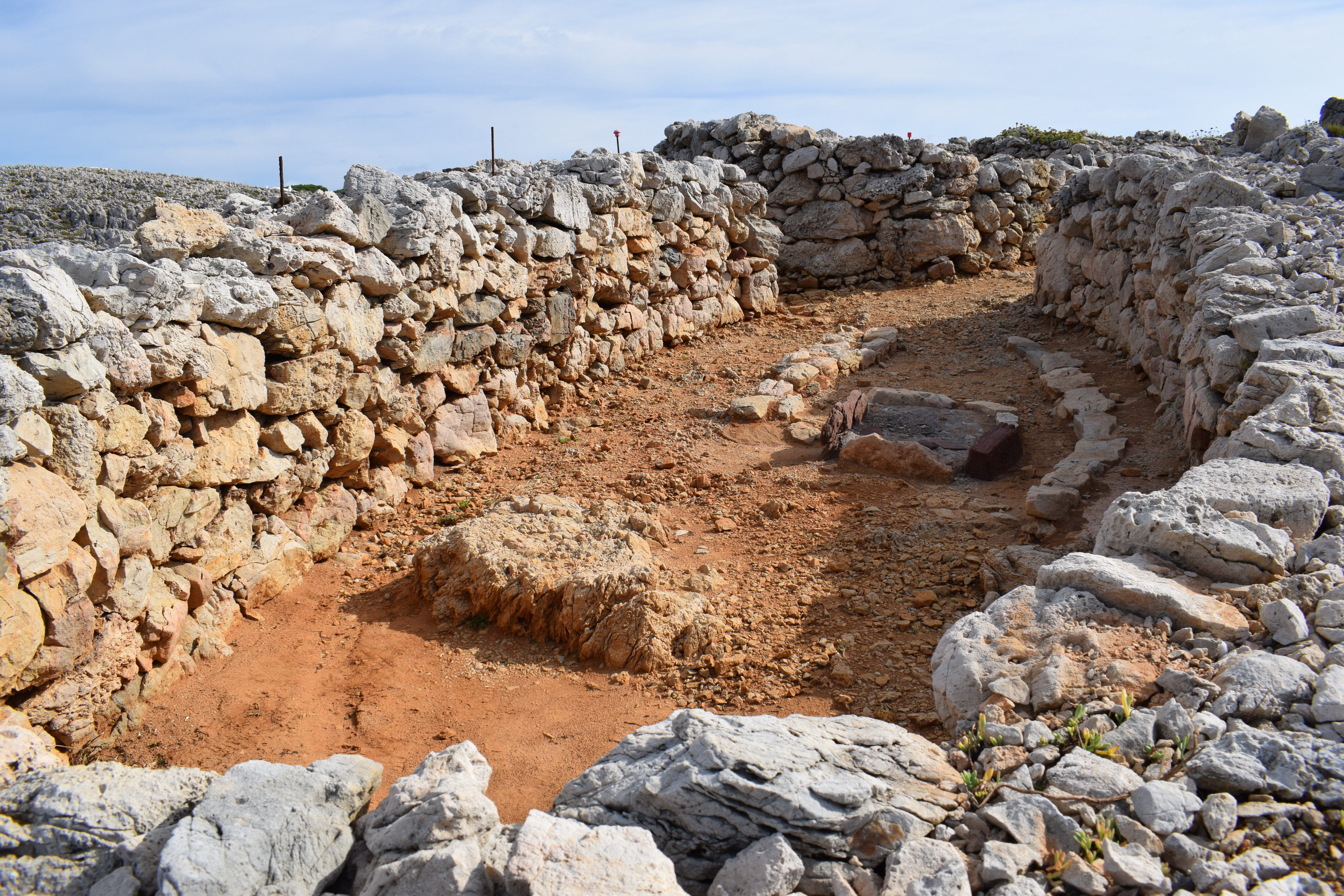 Reste eines naviformen Hauses in der Küstensiedlung von Cala Morell.